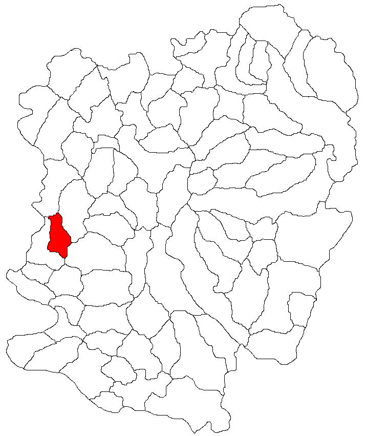 Categorie:Hărţi ale judeţului Caraş-Severin